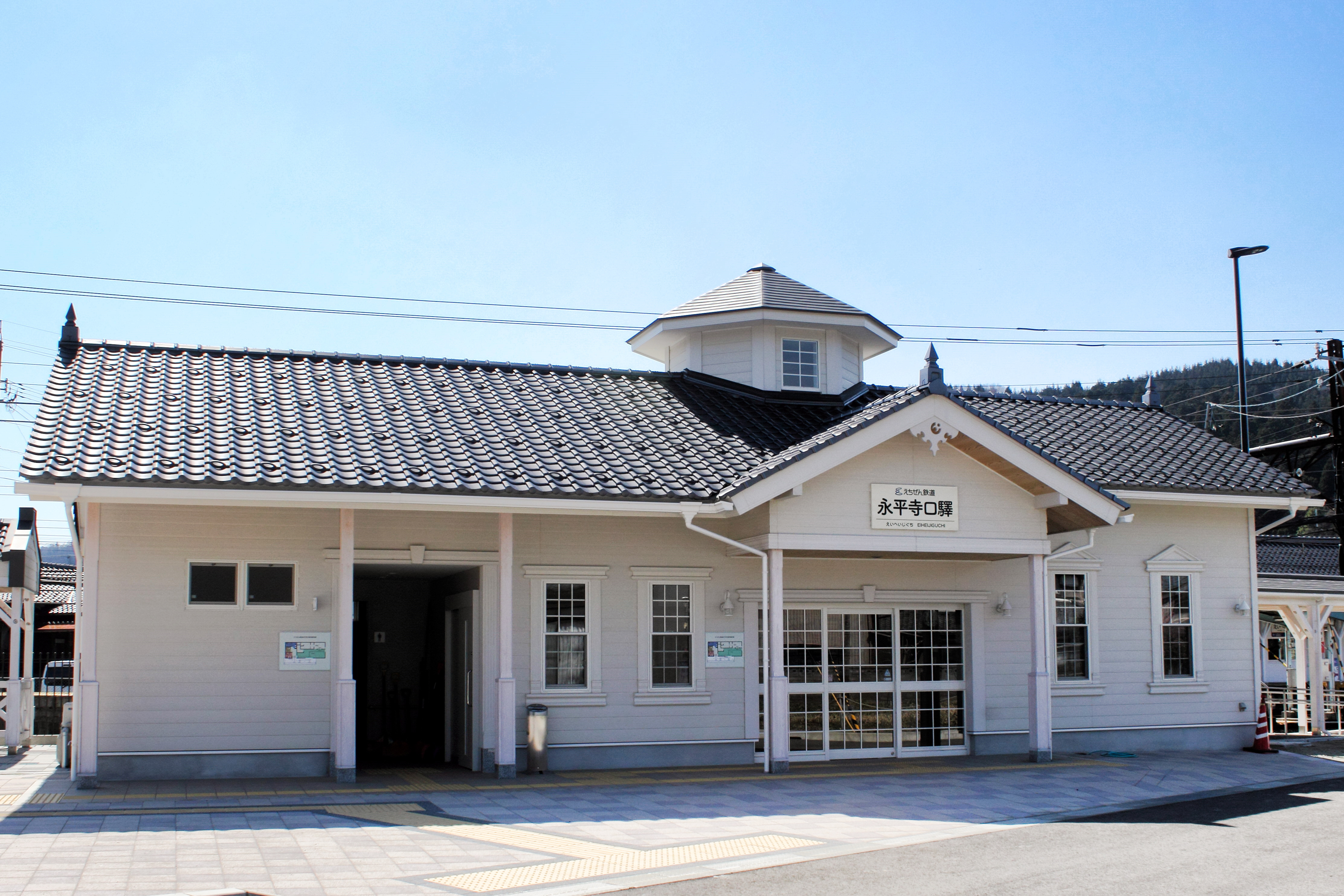 永平寺口駅 駅舎(2015)